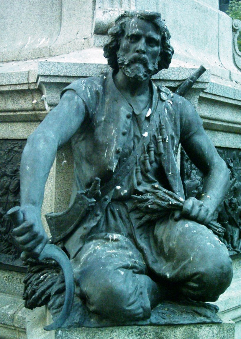 Bronze représentant Charles Le Moyne, situé à la Place d'Armes. Oeuvre de Louis-Philippe Hébert.